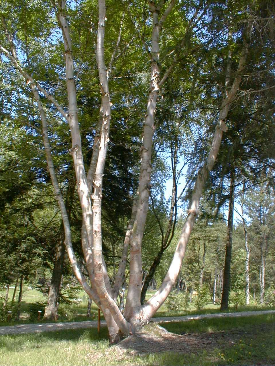 Baum im Juni 1999